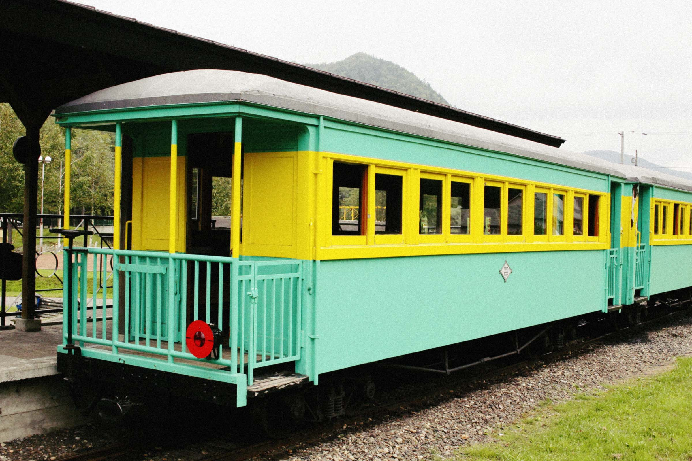 井笠鉄道ホハ13。北海道遠軽町「丸瀬布森林公園いこいの森」にて2014年撮影。